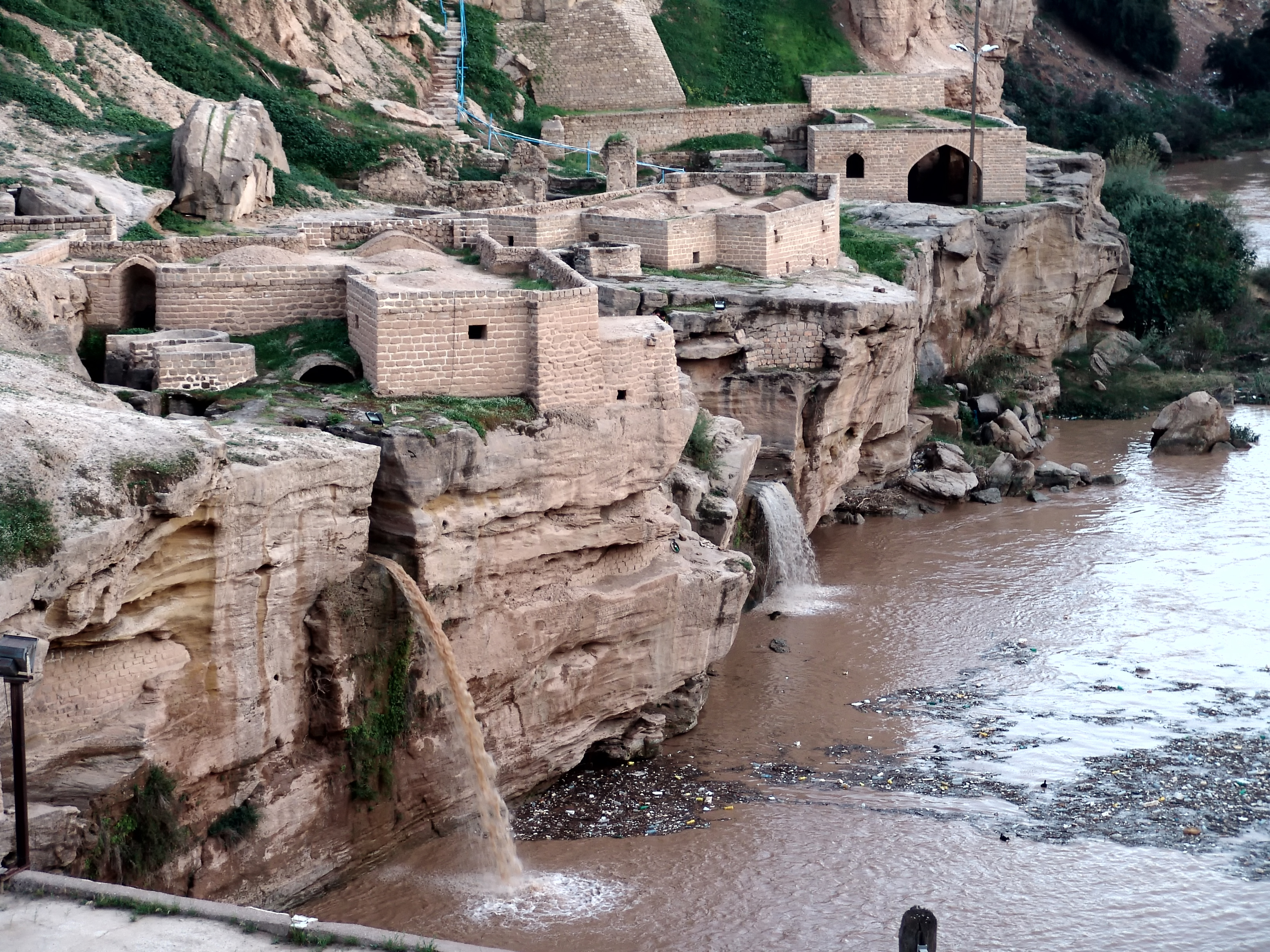 آسیاب‌ها و آبشارهای شوشتر، ایران